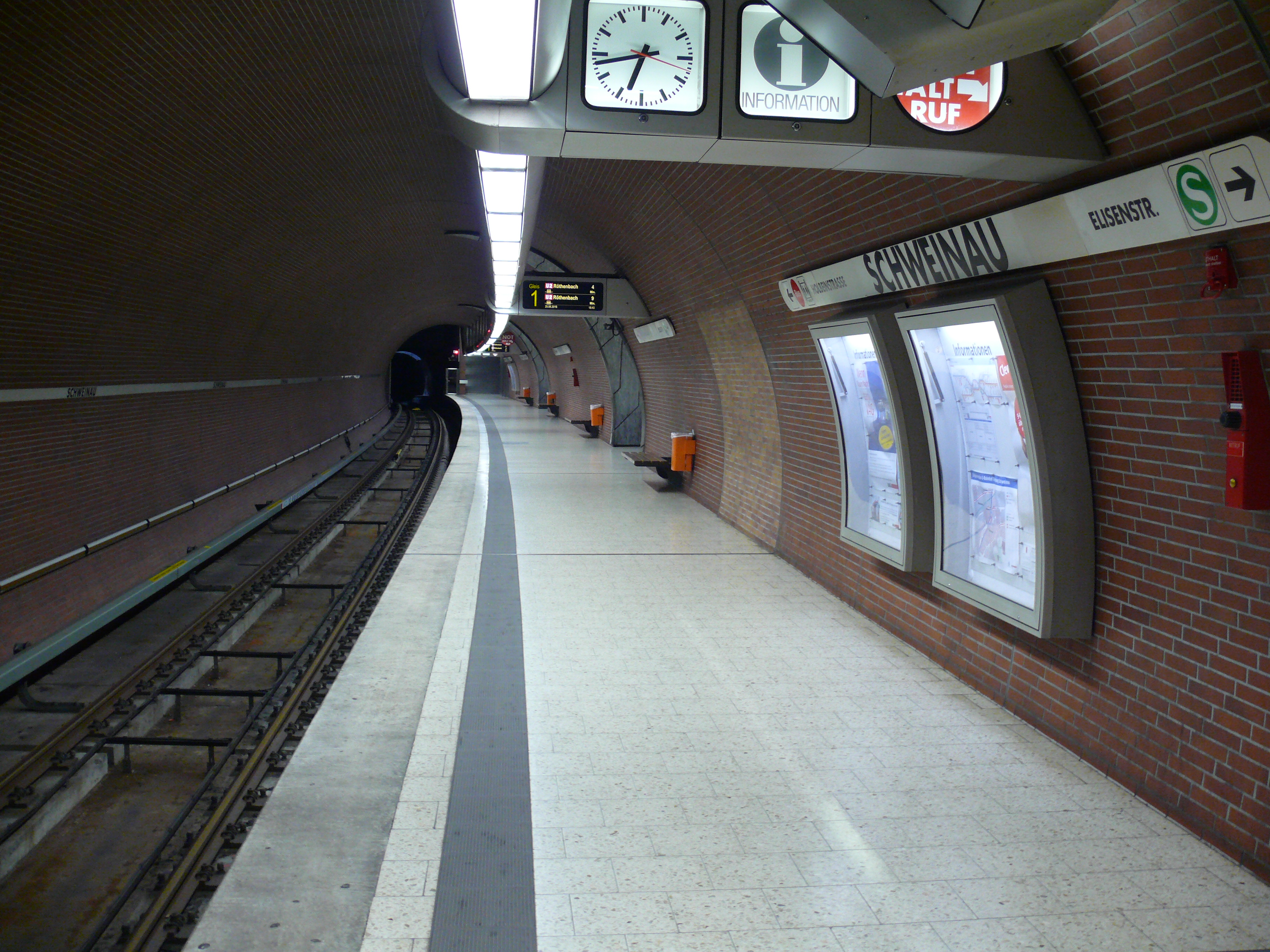 Gleis 1 am U-Bahnhof Schweinau in Nürnberg.